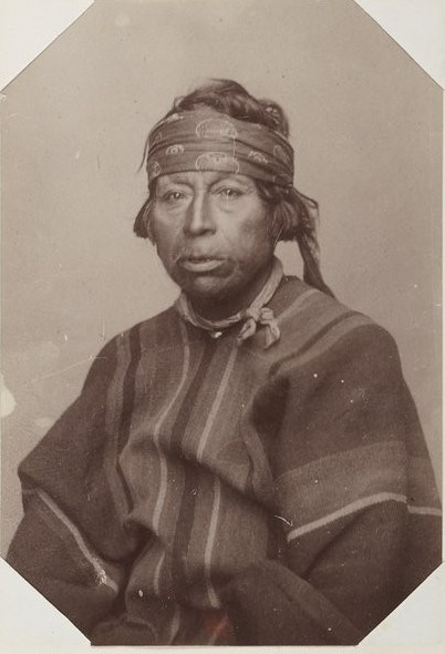 Hombre Mapuche a comienzos del siglo XX.